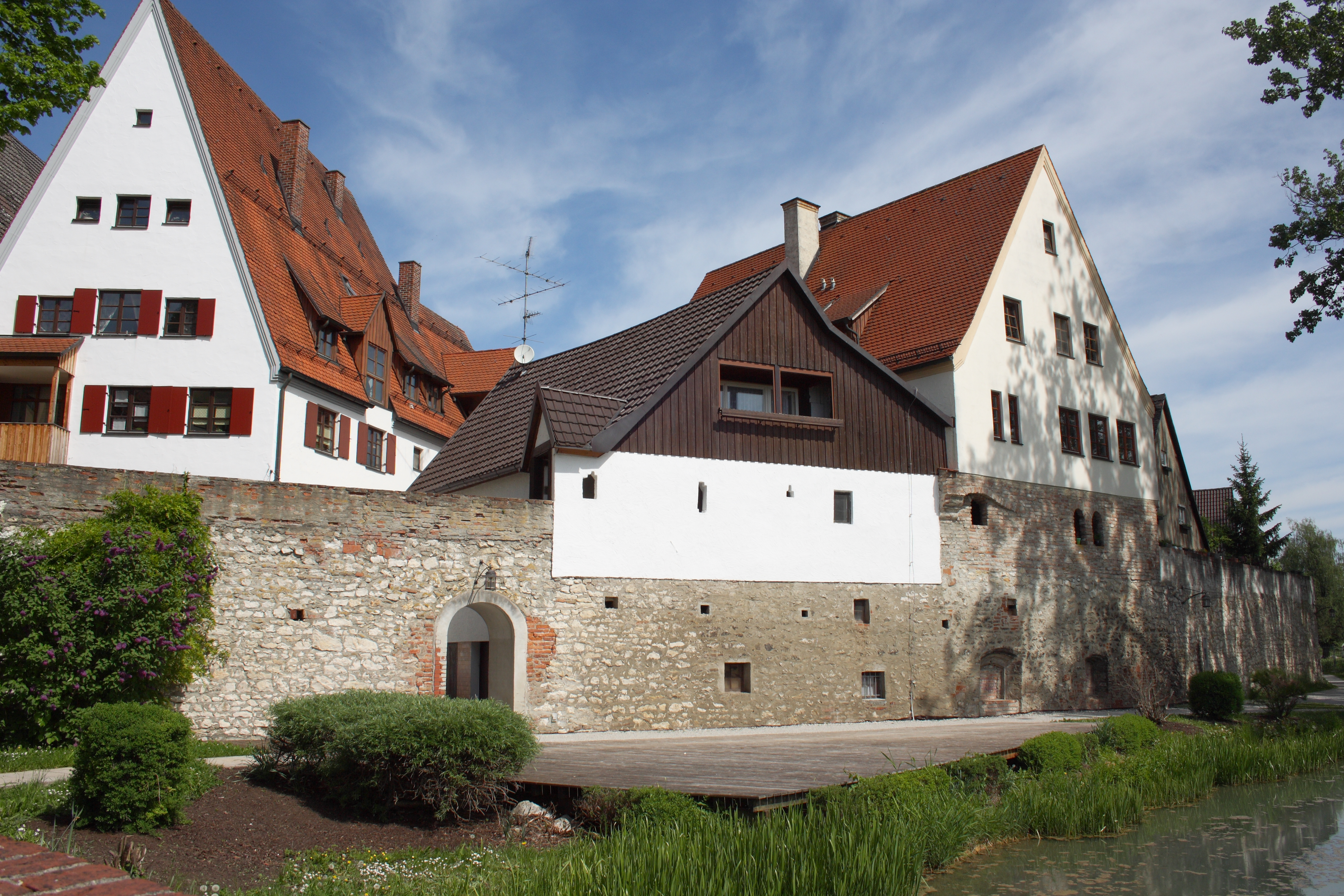 Stadtmauer in Lauingen im Landkreis Dillingen an der Donau (Bayern), Gebäude neben dem Tränktor